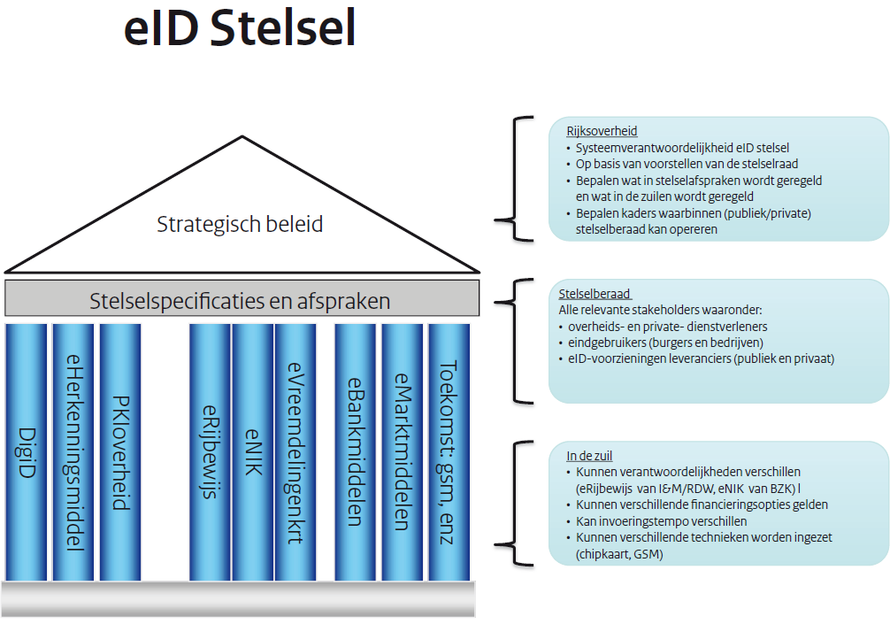 eID Stelsel Nederland. Strategische verkenning en voorstel voor vervolg (2012).